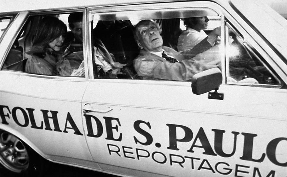 Jorge Luis Borges chega para debate no pátio de reportagem da Folha, em 1984. Atrás, Maria Kodama, que foi mulher do escritor argentino